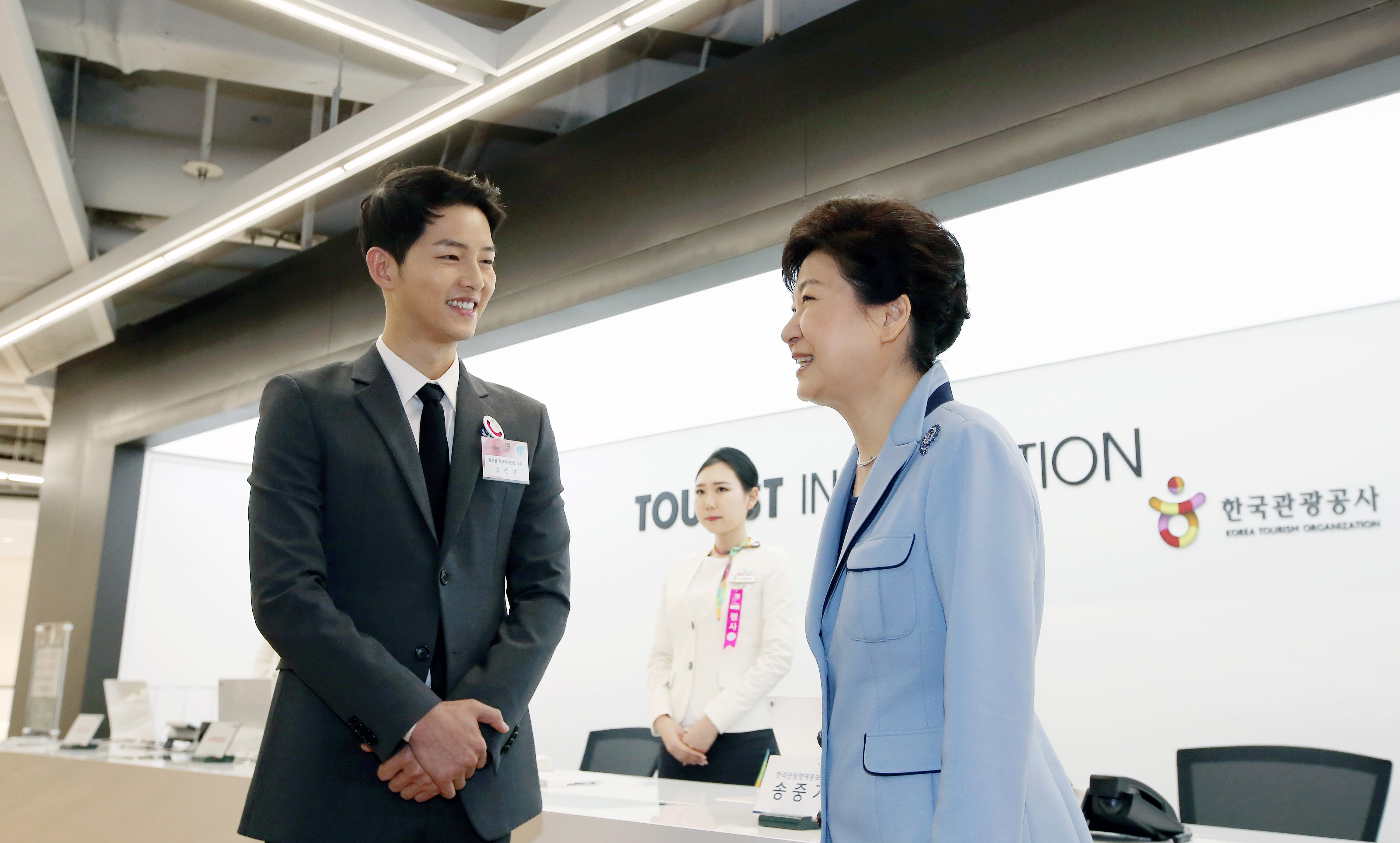 K-Style Hub Opening Ceremony April 11, 2016 K-Style Hub, Jung-gu, Seoul Ministry of Culture, Sports and Tourism Korean Culture and Information Service ( Official Photographer : Jeon Han This official Republic of Korea photograph is being made available only for publication by news organizations and/or for personal printing by the subject(s) of the photograph. The photograph may not be manipulated in any way. Also, it may not be used in any type of commercial, advertisement, product or promotion that in any way suggests approval or endorsement from the government of the Republic of Korea. K 스타일 허브 한국문화관 개관식 2016-04-11 K 스타일 허브 한국문화관 문화체육관광부 해외문화홍보원 코리아넷 전한